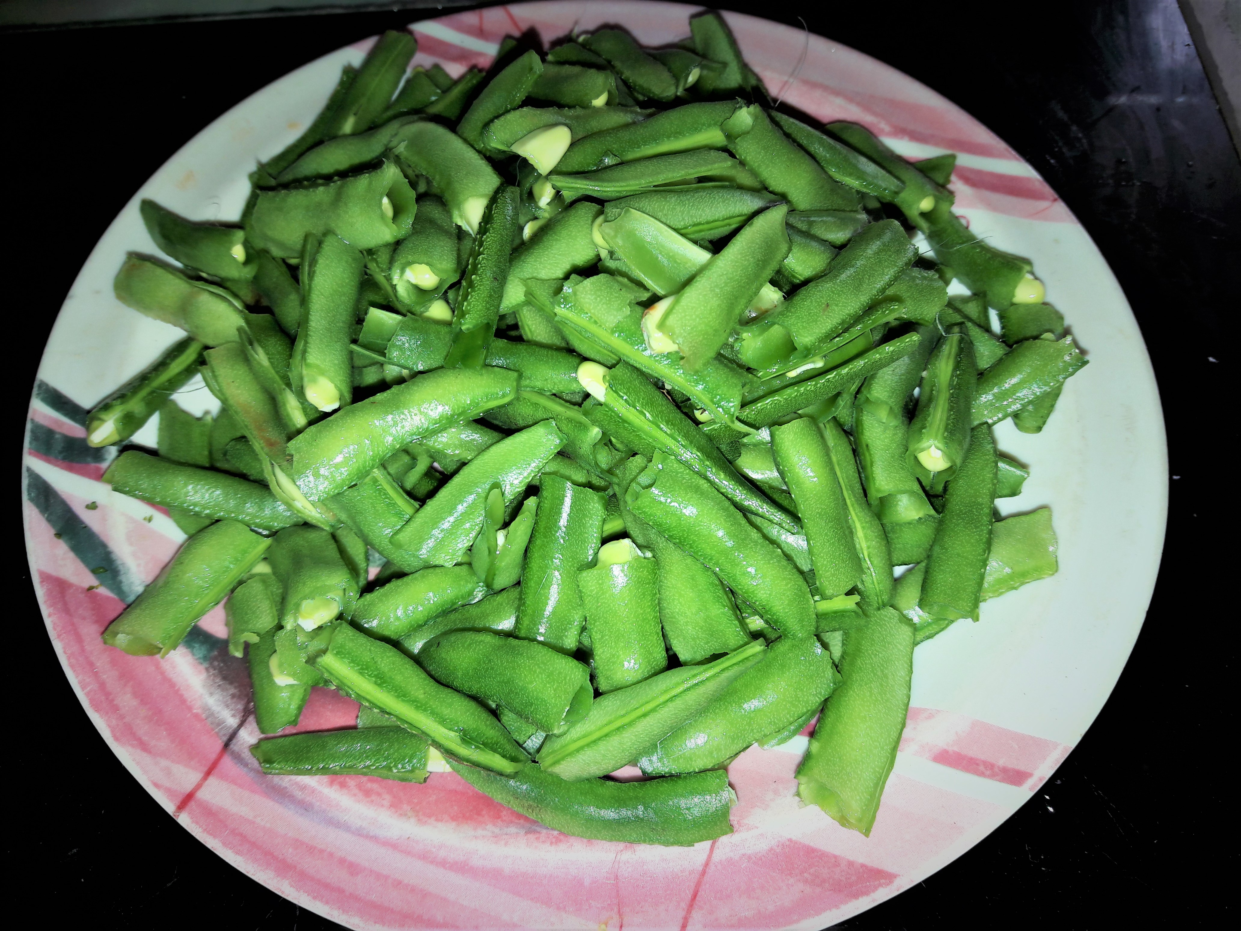 చిక్కుడుకాయ ముక్కలు